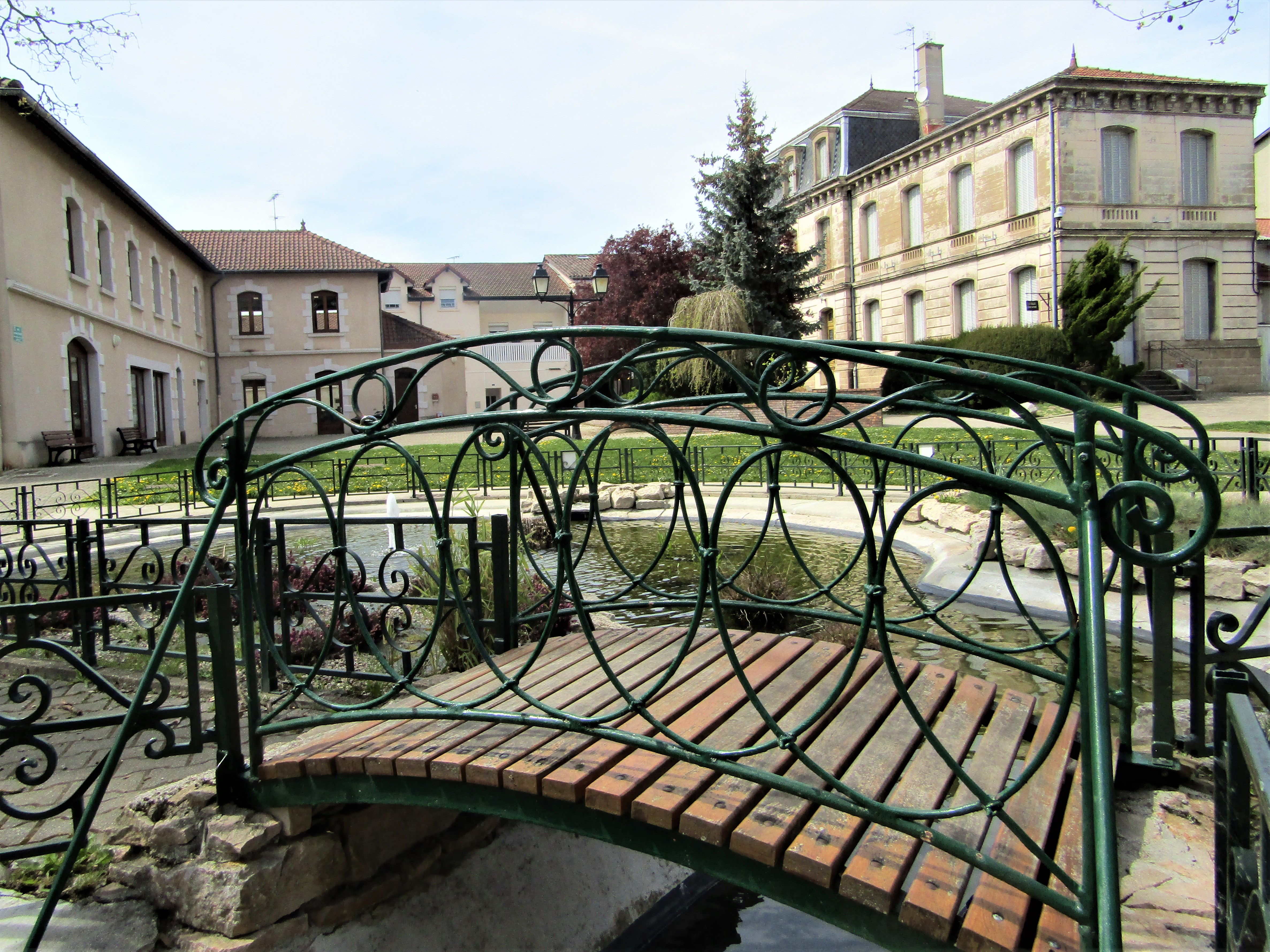 Square de Saint-Jean-de-Bournay en avril 2019